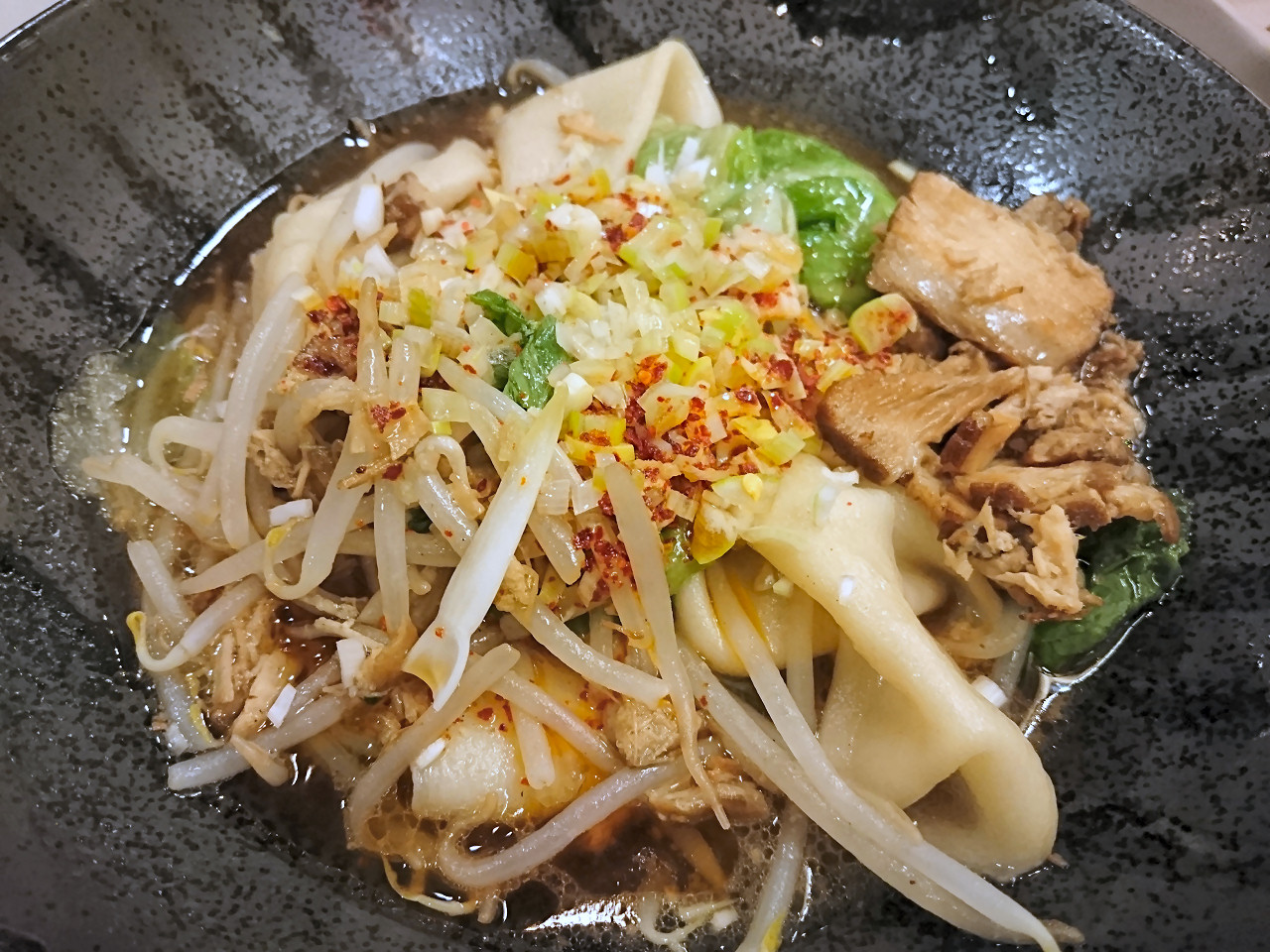 大阪市中央区島之内の西安料理店「朋友雑穀食府」のメニュー